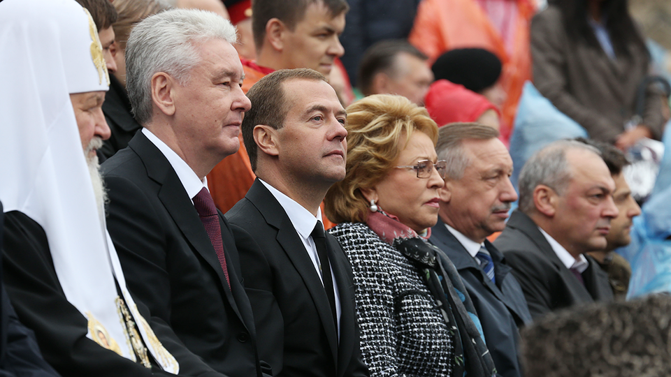 Дмитрий Медведев с Патриархом Московским и всея Руси Кириллом, мэром Москвы Сергеем Собяниным и председателем Совета Федерации Валентиной Матвиенко на торжественной церемонии по случаю празднования Дня города на Красной площади